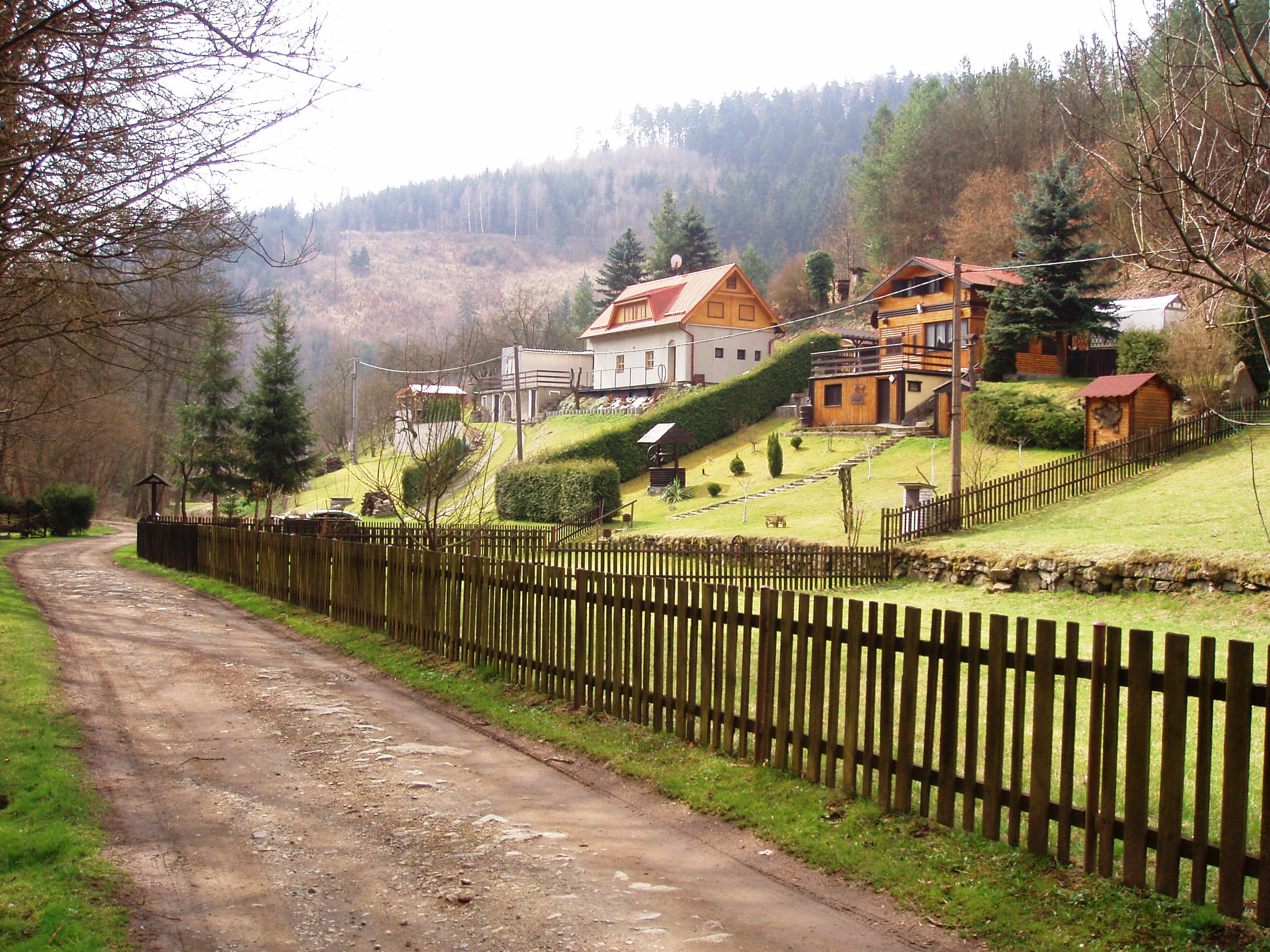 Horní Líšnice